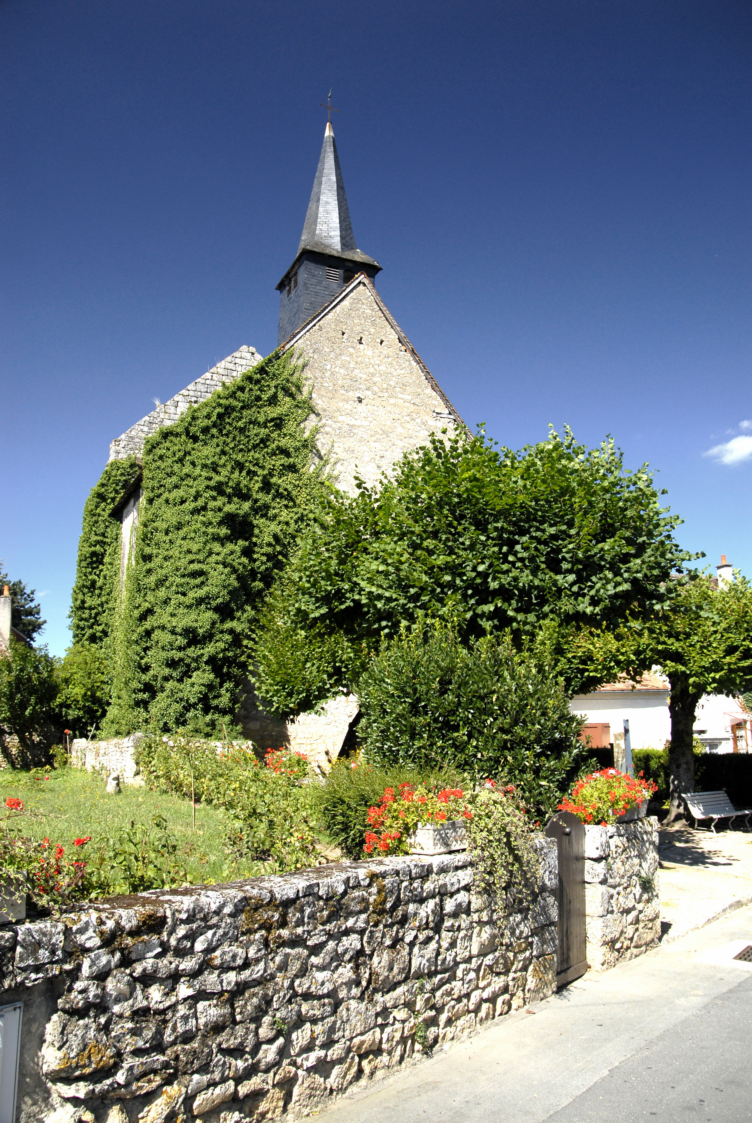 Angles-sur-l'Anglin, Saint-Croix, ehem. Abteikirche